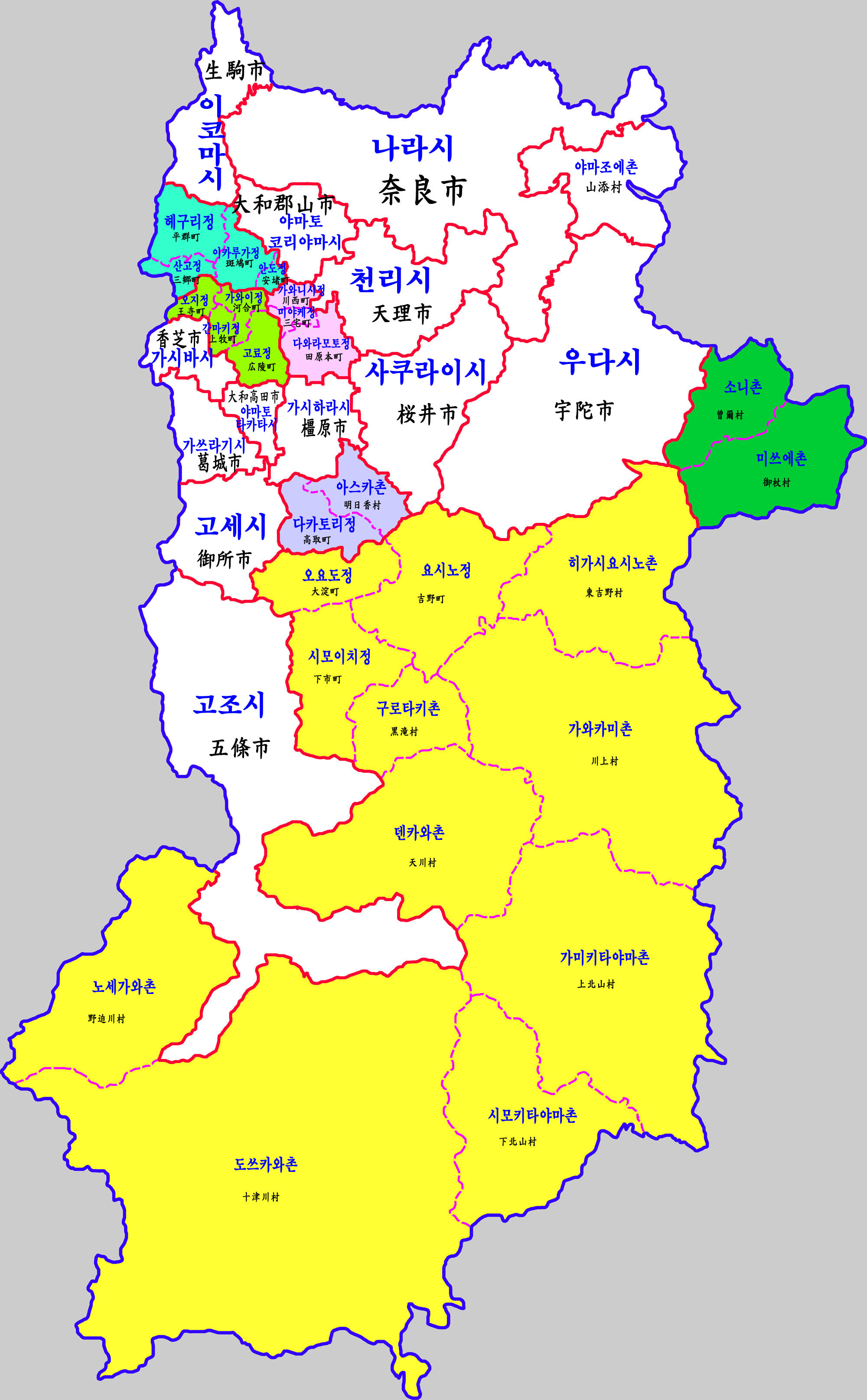 나라현 행정구역